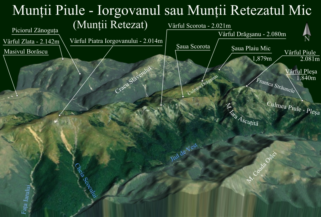 Harta 3D pentru Retezatul Mic din Muntii Retezat, Romania.